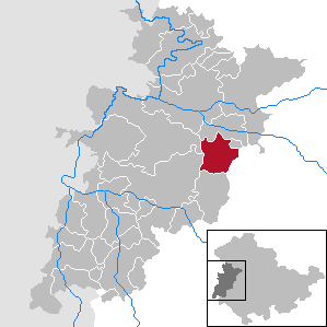 Ruhla in Thuringia - Wartburgkreis